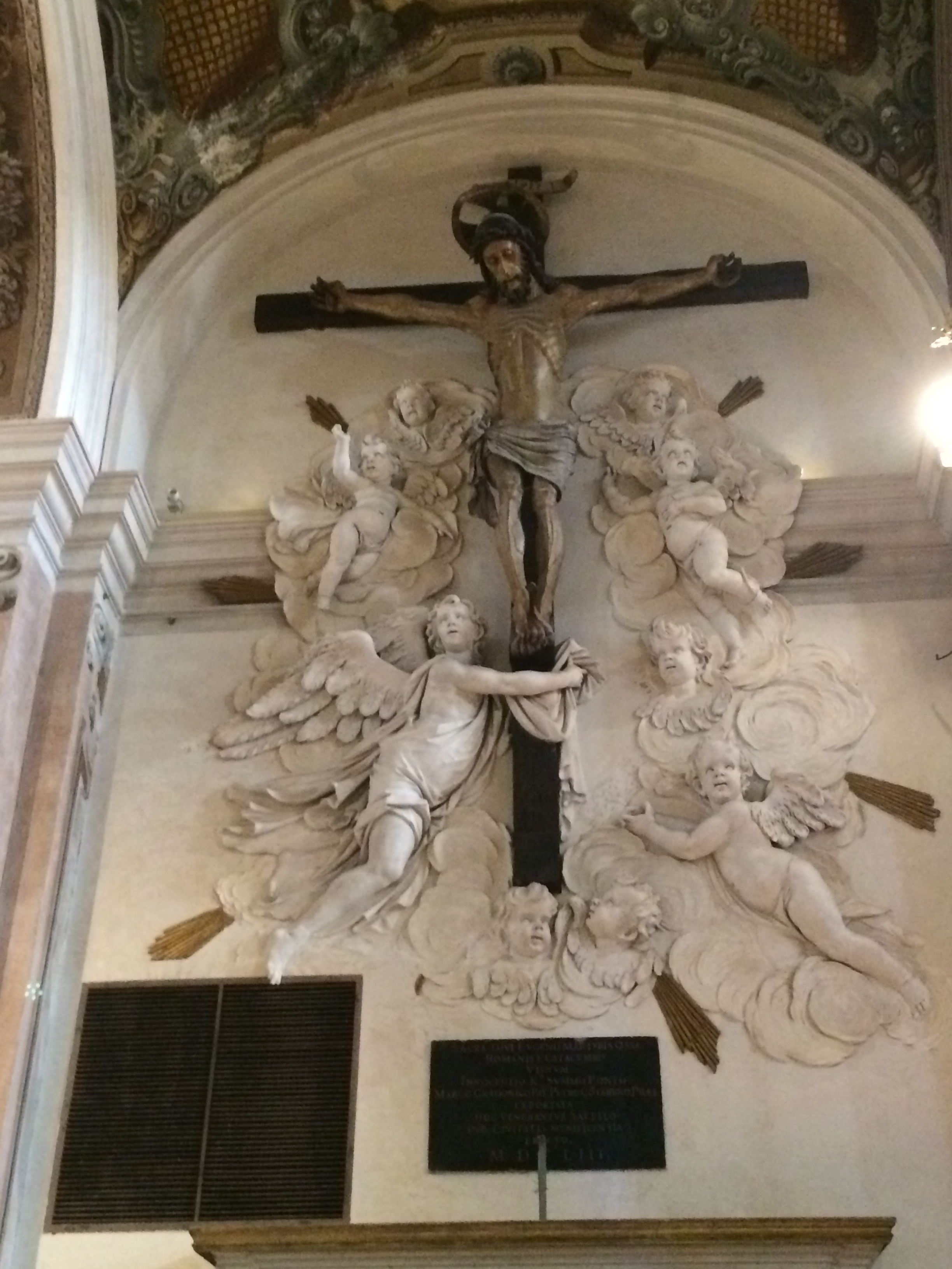 Crocifisso-Duomo di Udine Opera di Bartolomeo dall'Occhio (1473) Stucchi di Abbondio Stazio